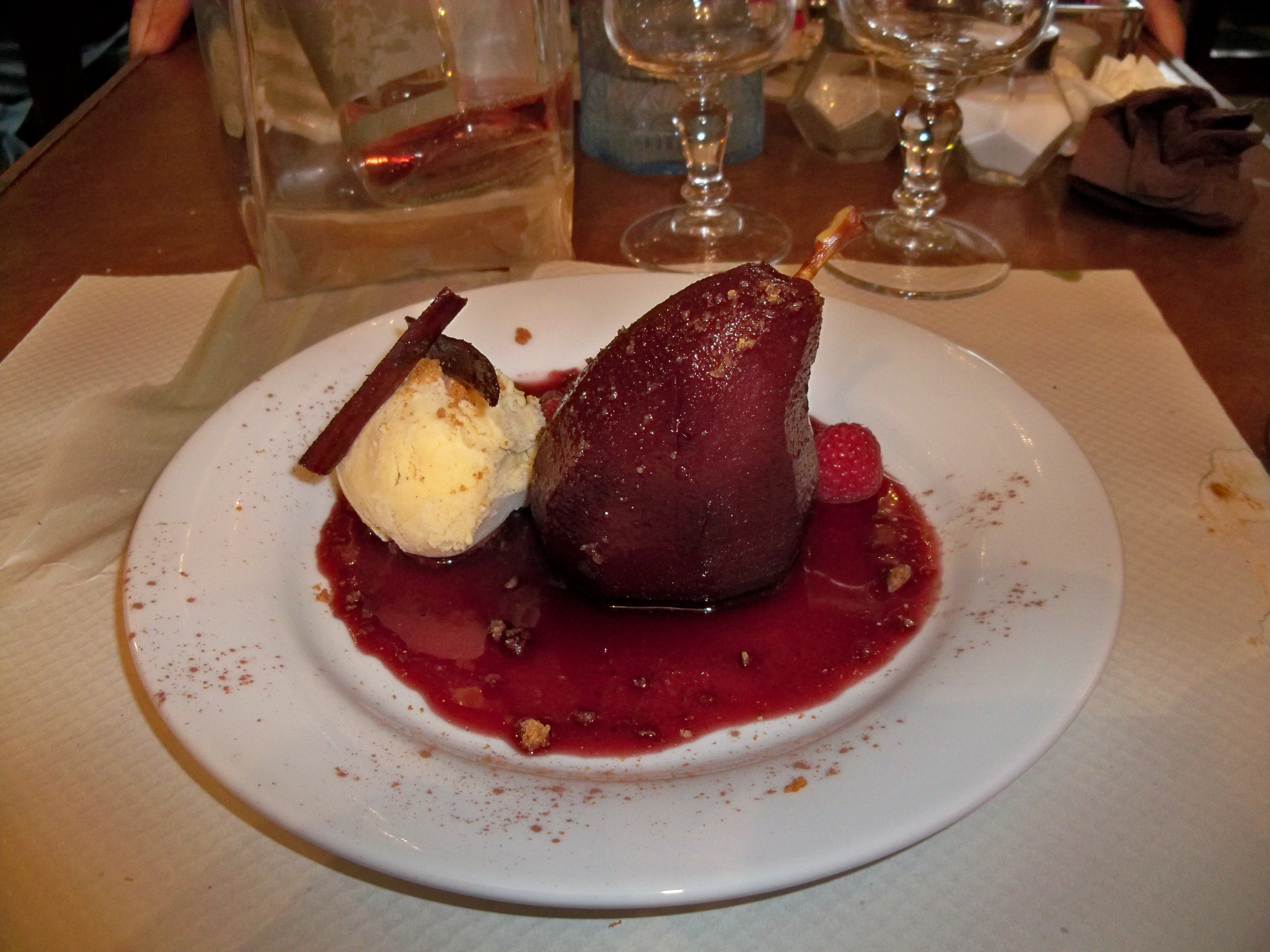 Poire au vin